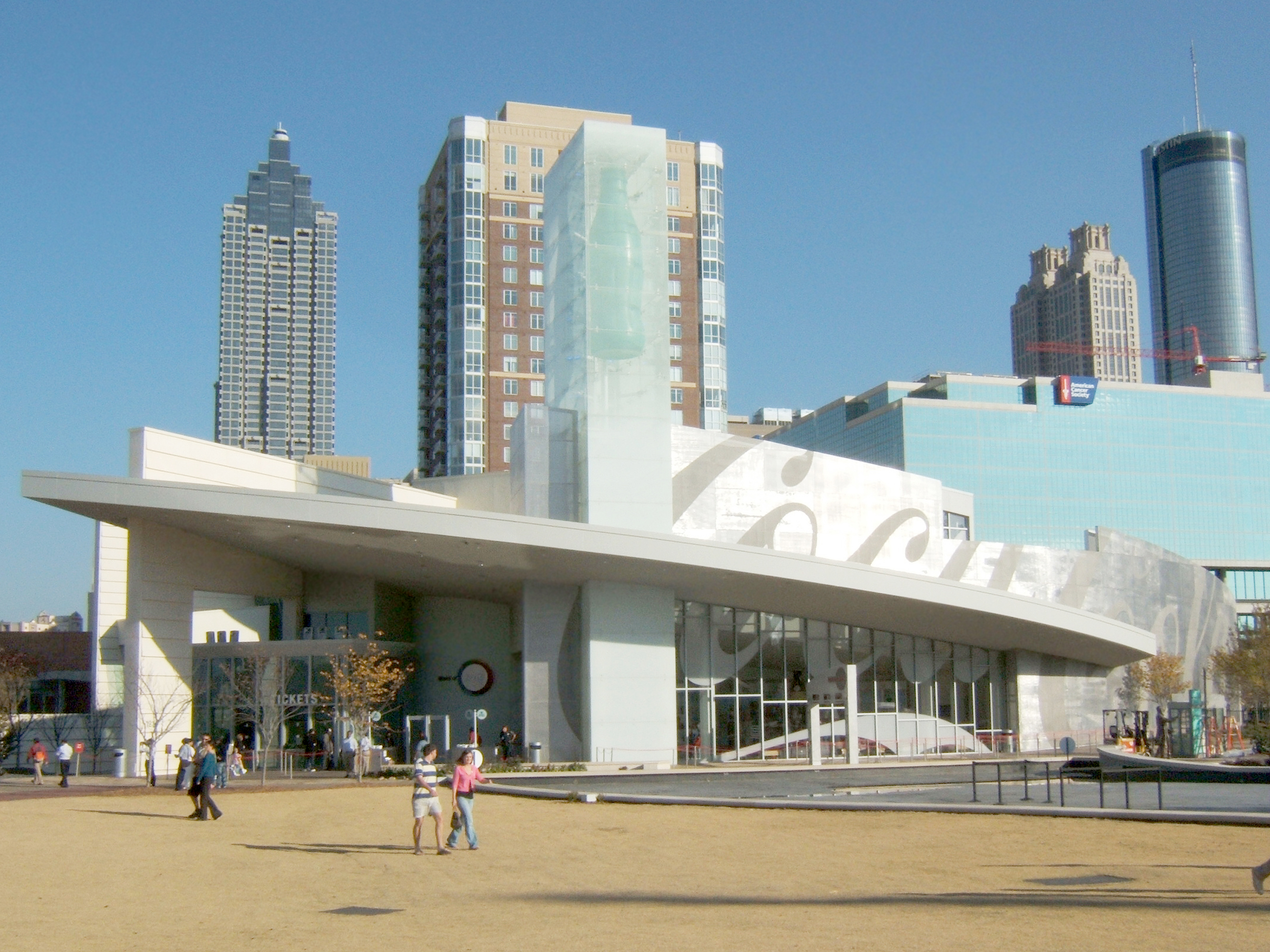 Façade et entrée du "World of Coca-Cola", le musée de la compagnie Coca-Cola à Atlanta.